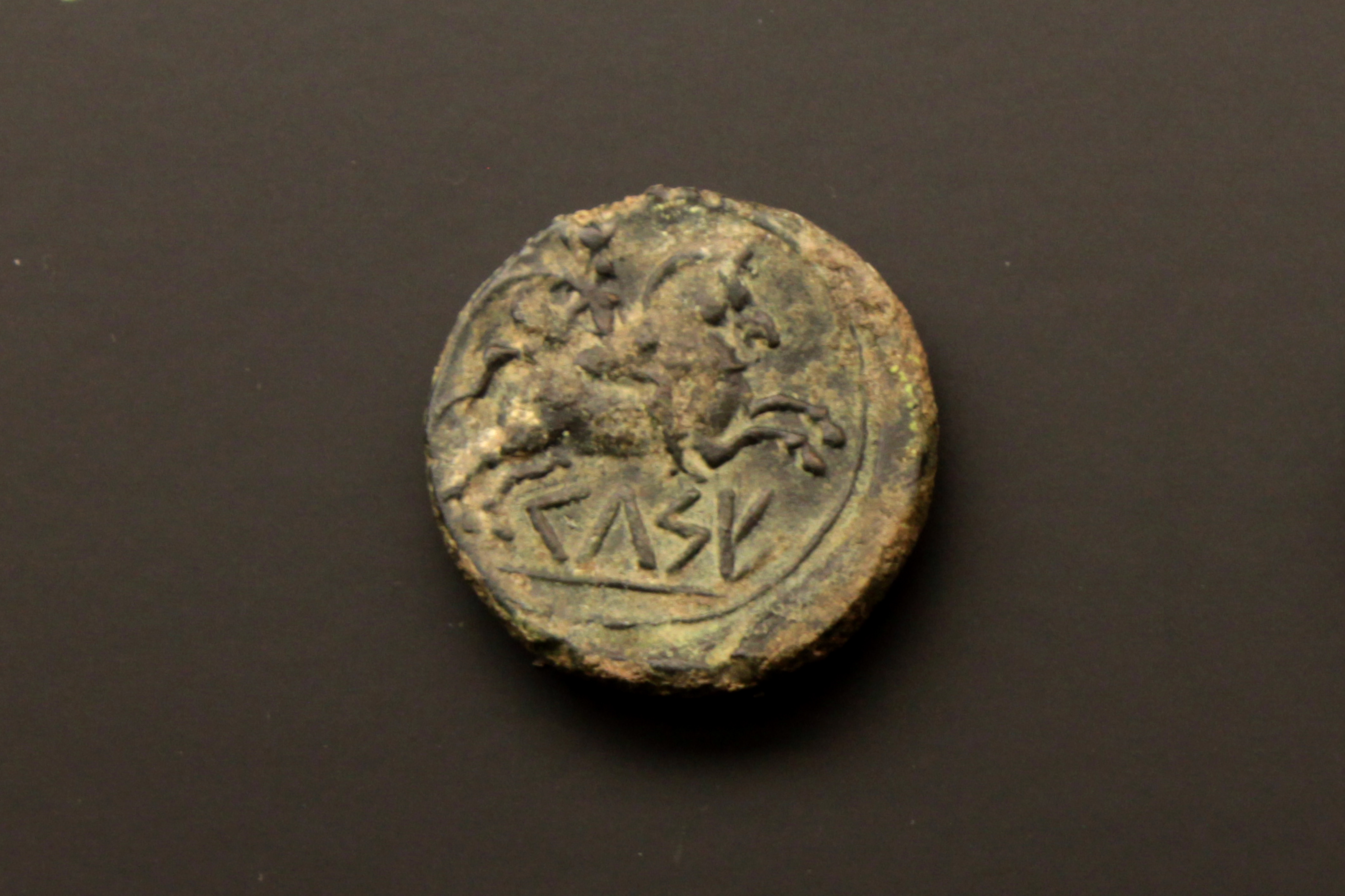 Moneda ibera de Kelse de los siglos II al I a. C. Depositada en el Museo de prehistoria de Valencia, Comunidad valenciana, España.